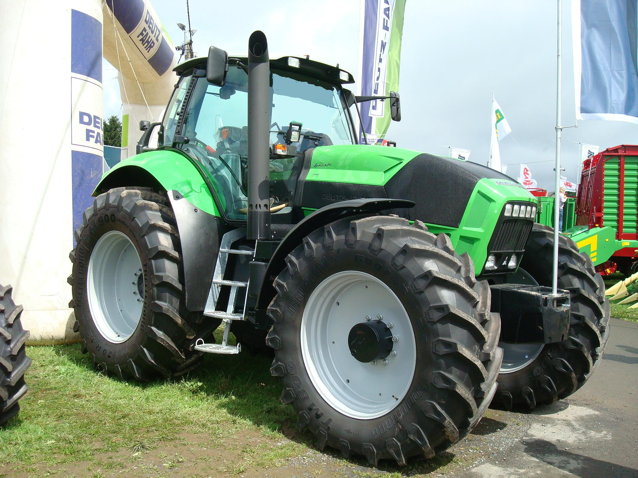 Deutz-Fahr Agrotron X 710